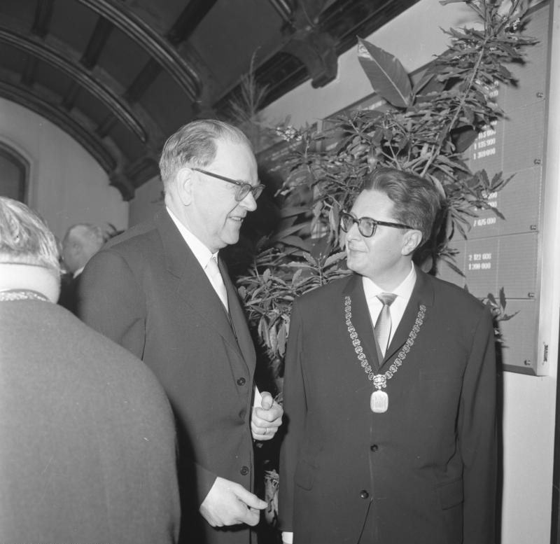 Besuch des schwedischen Ministerpräsidenten, Tage Erlander, im Rathaus München